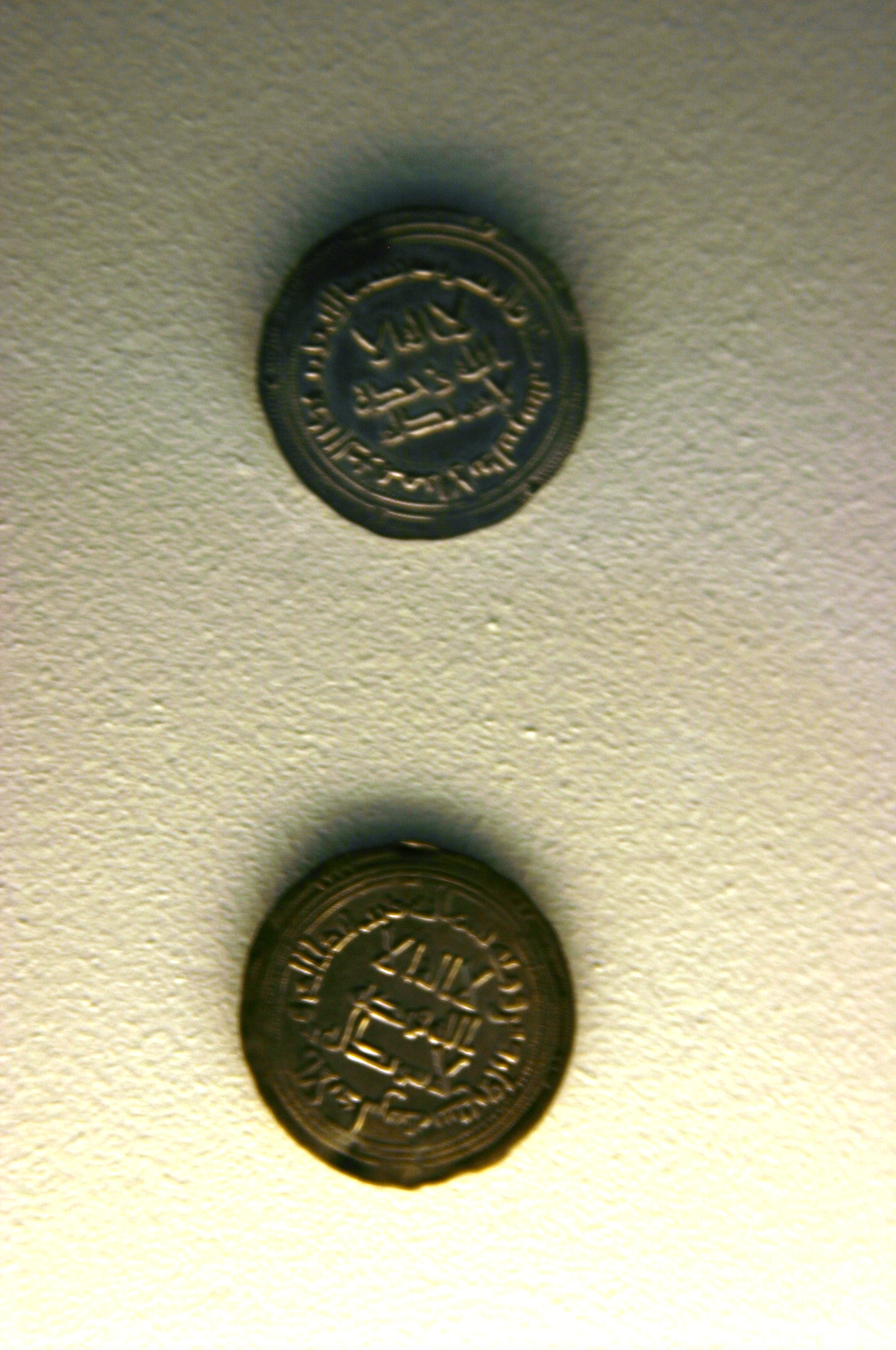 Dirham